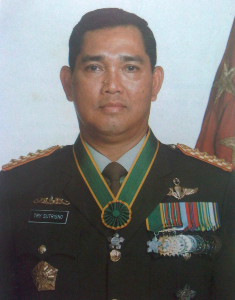 Jenderal TNI Try Sutrisno saat sebagai Panglima ABRI Licensing Kategori:Panglima Tentara Nasional Indonesia